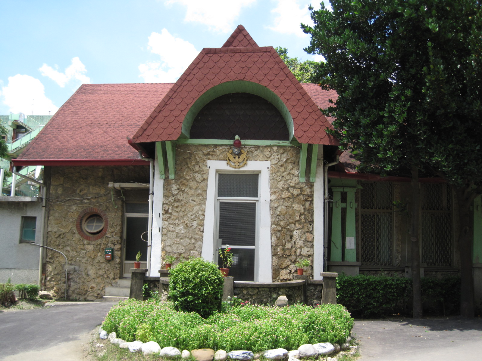 臺南公園管理所